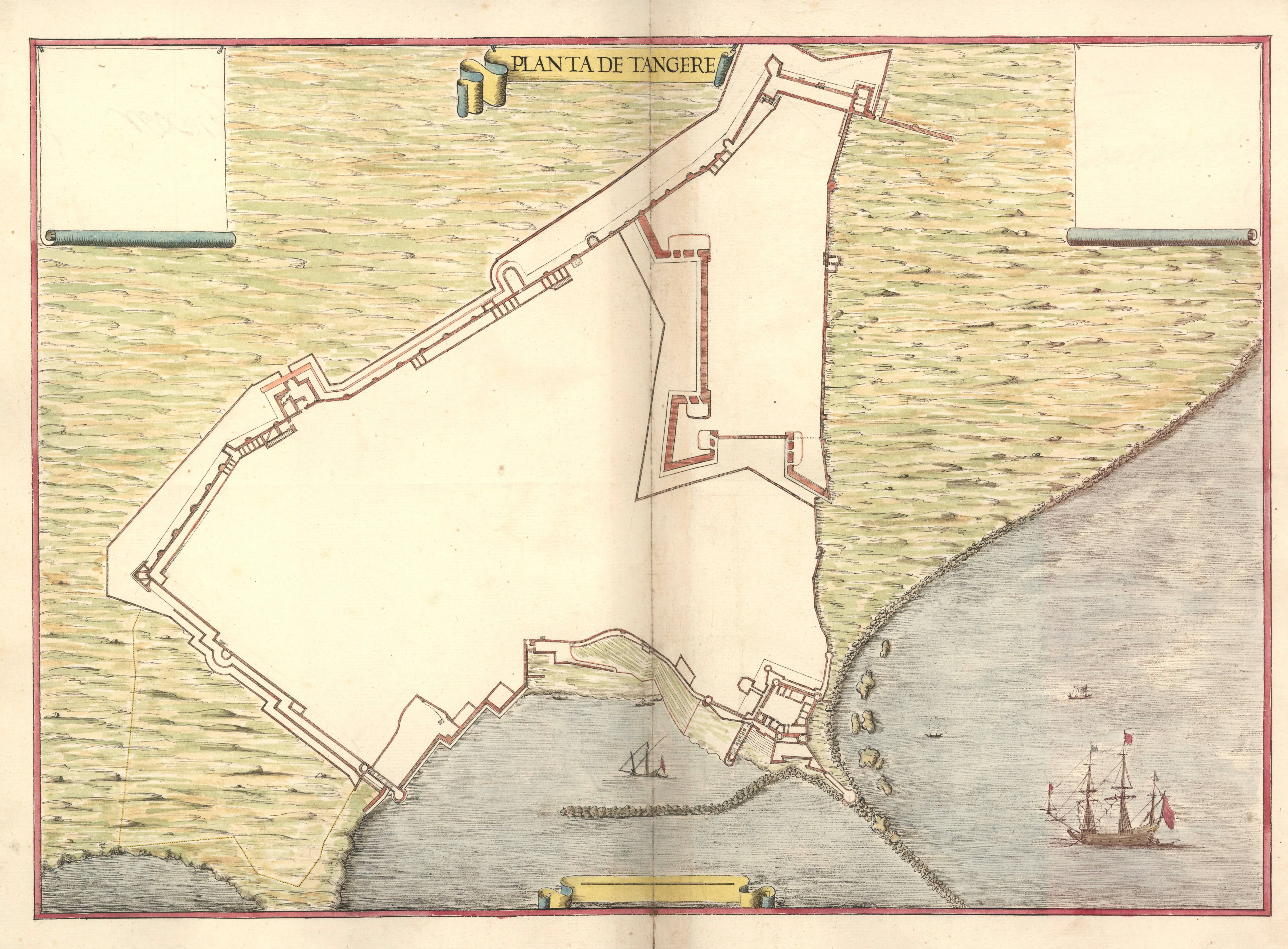 Planta de Tangere. Planta aguarelada. Atlas de Leonardo de Ferrari, 1655. Arquivo Militar de Estocolmo, Krigsarkivet, (Handritade Kartverk, cota 51-36 1655), Suécia. Publicada por Rocío Sánchez Rubio, Isabel Testón Núñez e Carlos M. Sánchez Rúbio em Imagens de un Imperio perdido. El Atlas del marques de Heliche. Plantas de diferentes Plazas de España, Italia, Flandres y Las Indias, La memoria ausente. Cartografia de España y Portugal en el Archivo Militar de Estocolmo. Siglos XVII y XVIII, Badajoz, 4 Gatos, 2006, Espanha.